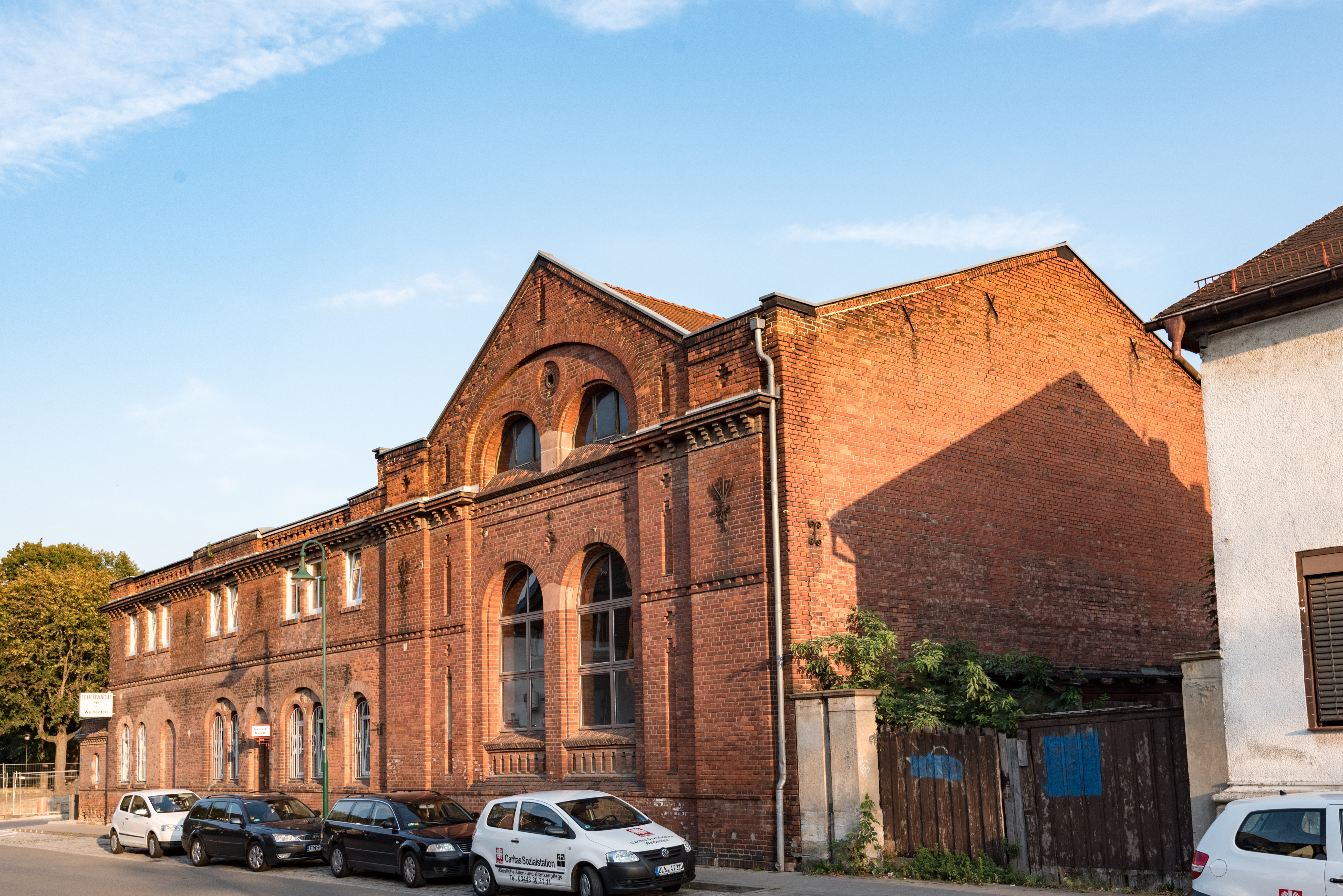 Weißenfels, Leopold-Kell-Straße 14